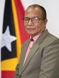 Fabião de Oliveira, Abgeordneter des Nationalparlaments Osttimors